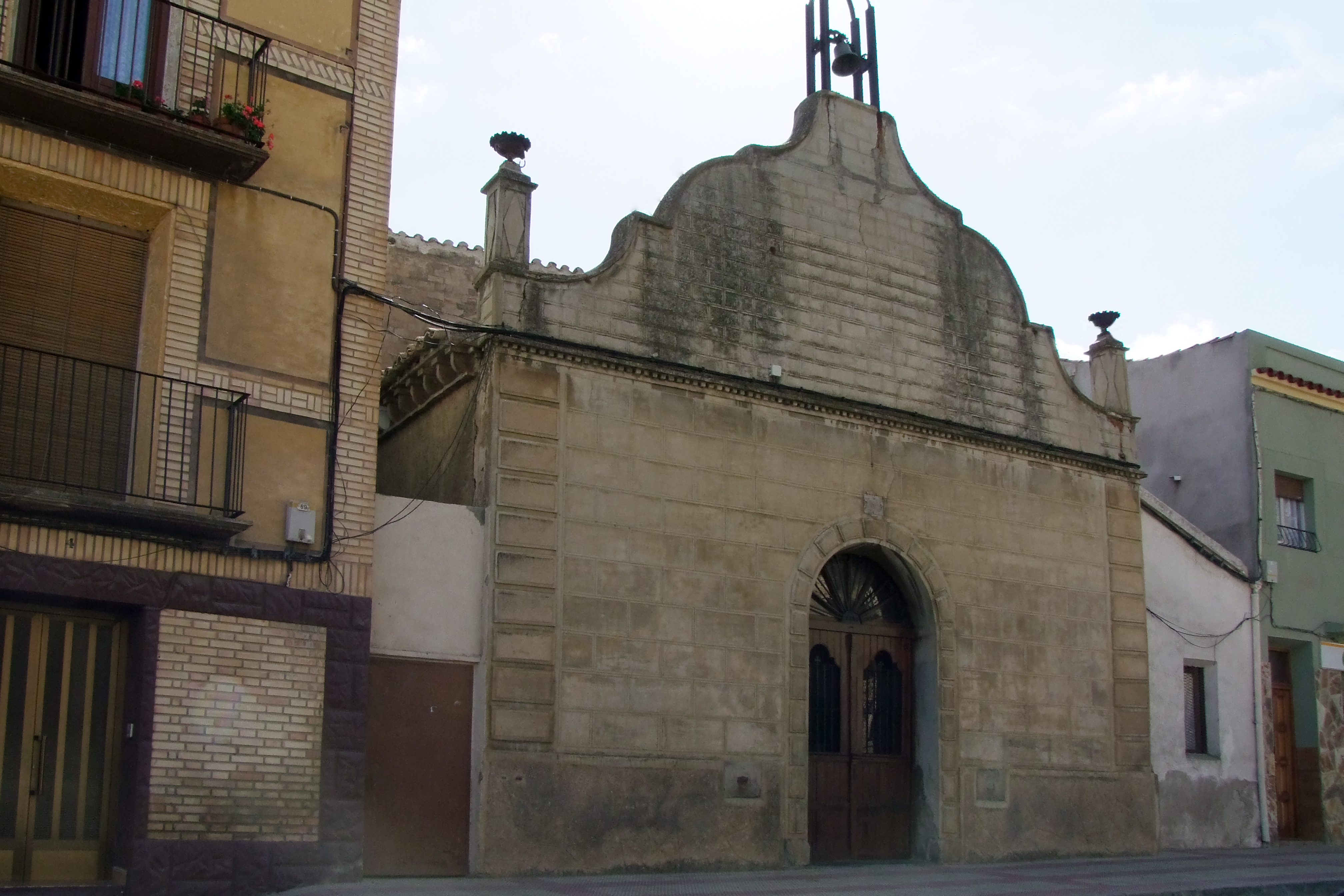 Ermita de San Antonio de Padua en la localidad de Cervera del Río Alhama, La Rioja - España